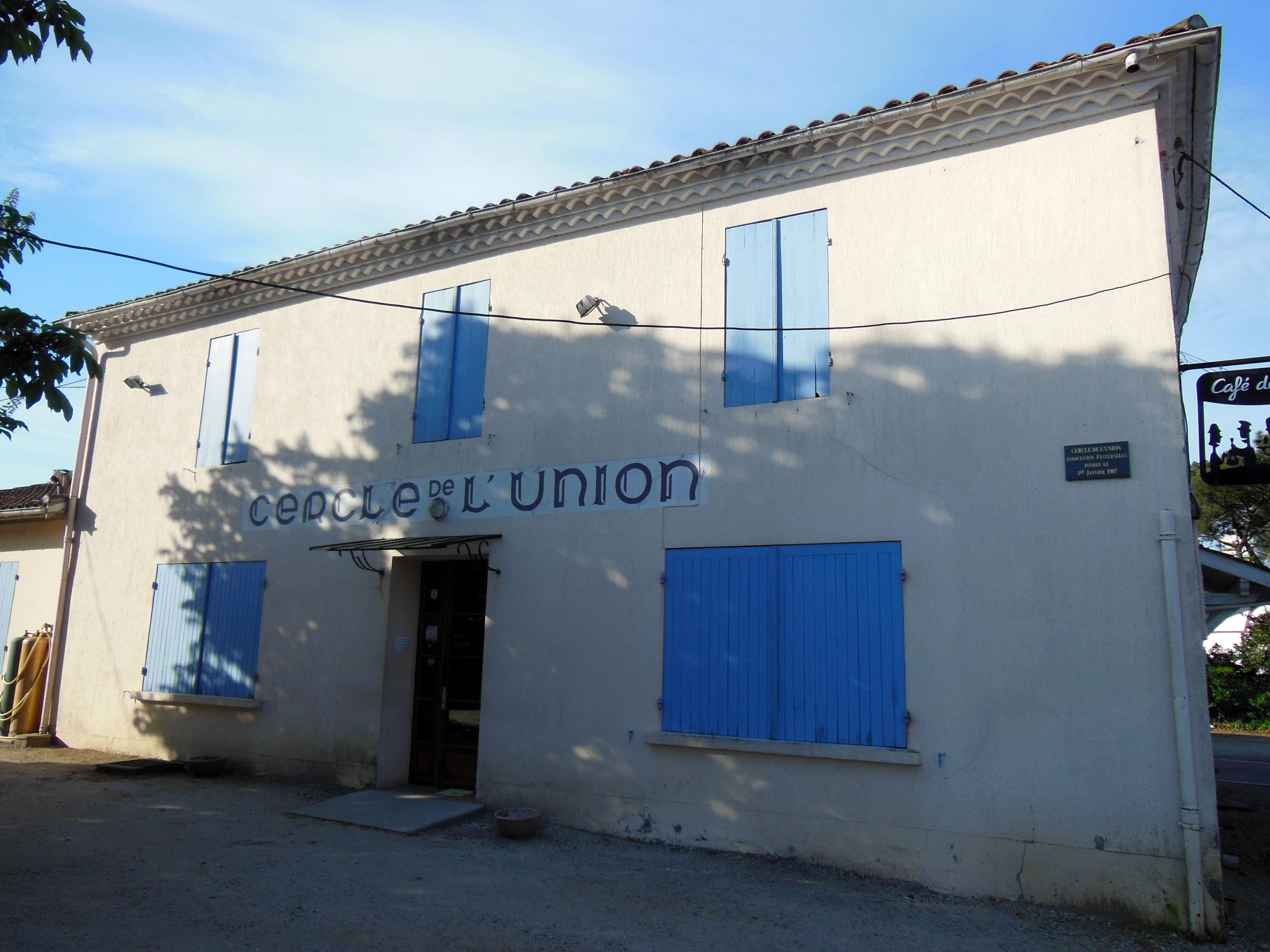 Cercle de l'Union de Pissos (Landes, France), un des cercles de Gascogne (façade)